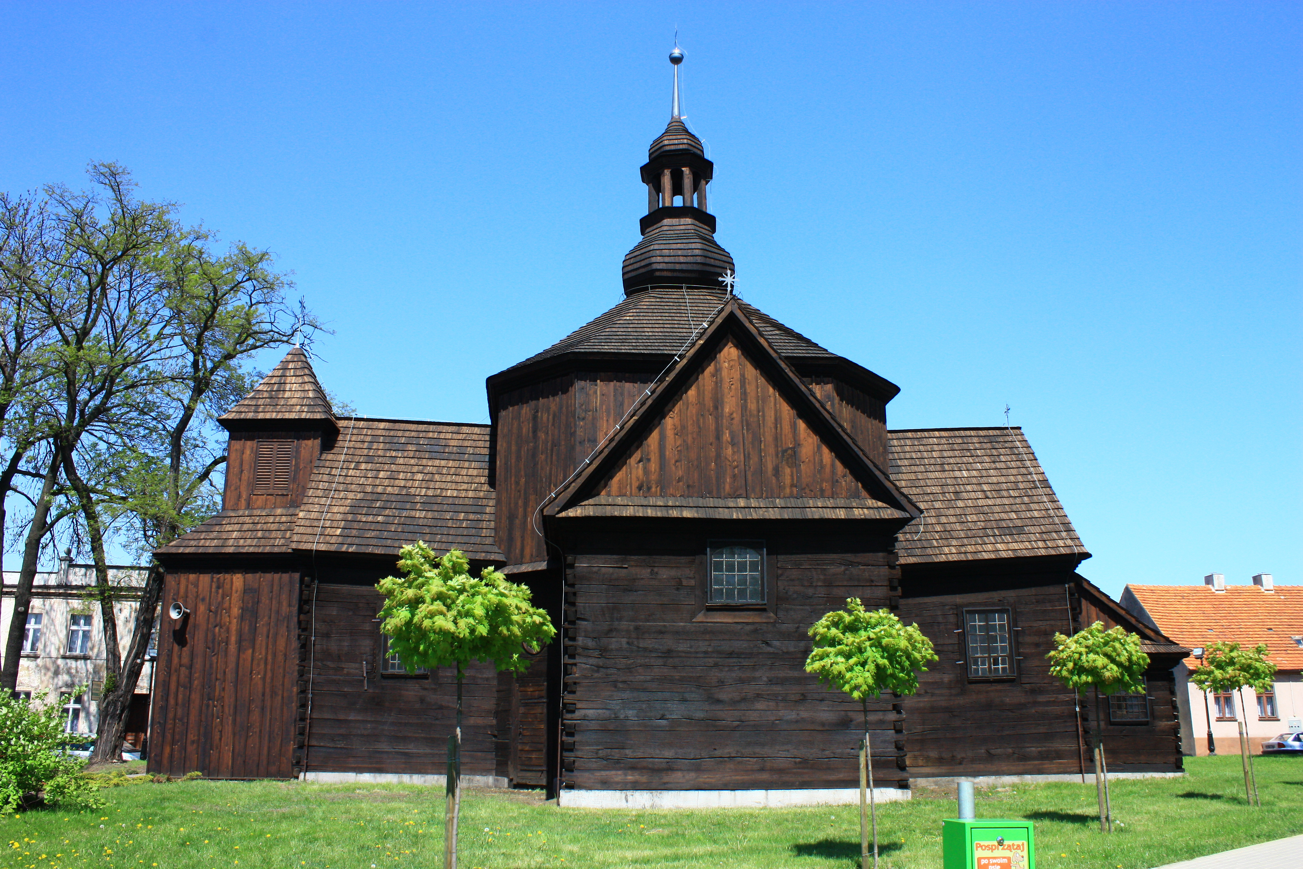 Krotoszyn, kościół fil. p.w. śś. Fabiana, Rocha, Sebastiana, 1572, 1813